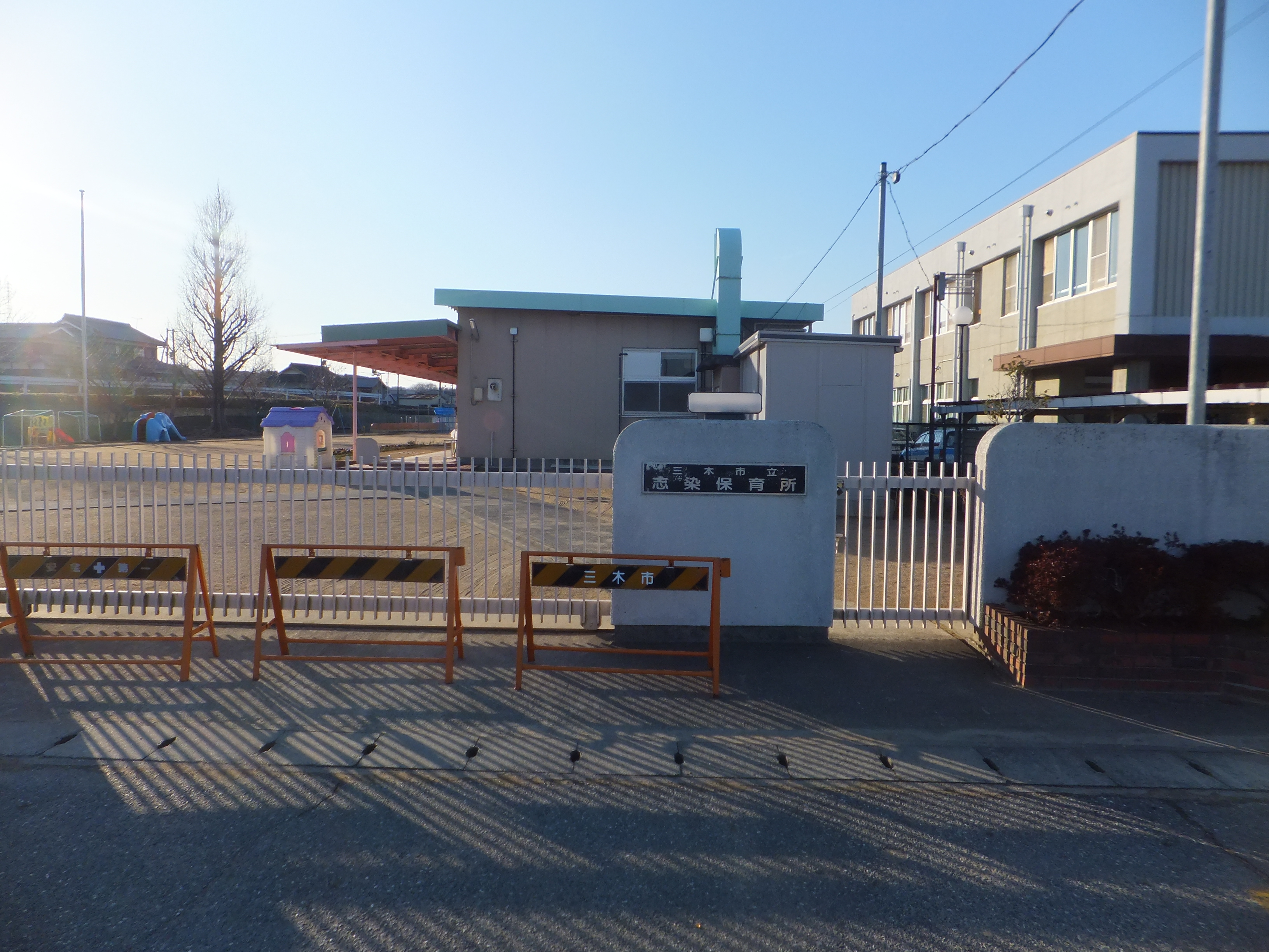 三木市立志染保育所